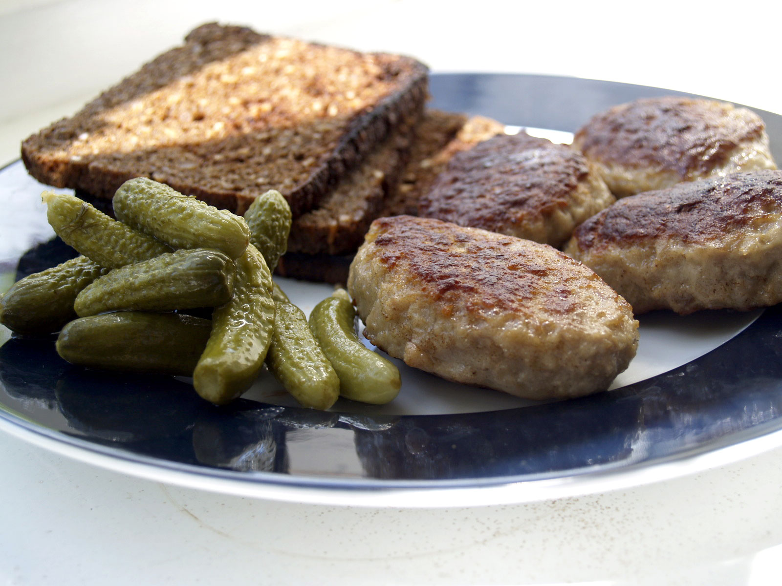 Frikadeller med ristet rugbrød og cornichons